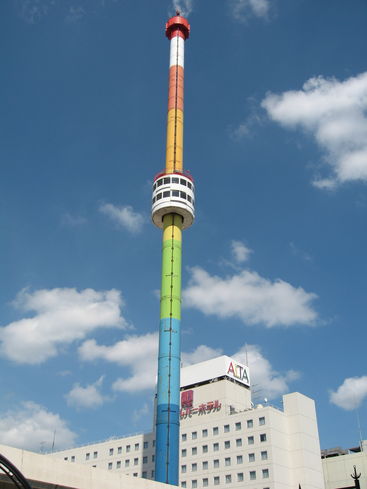 新潟県新潟市中央区。レインボータワーの画像。